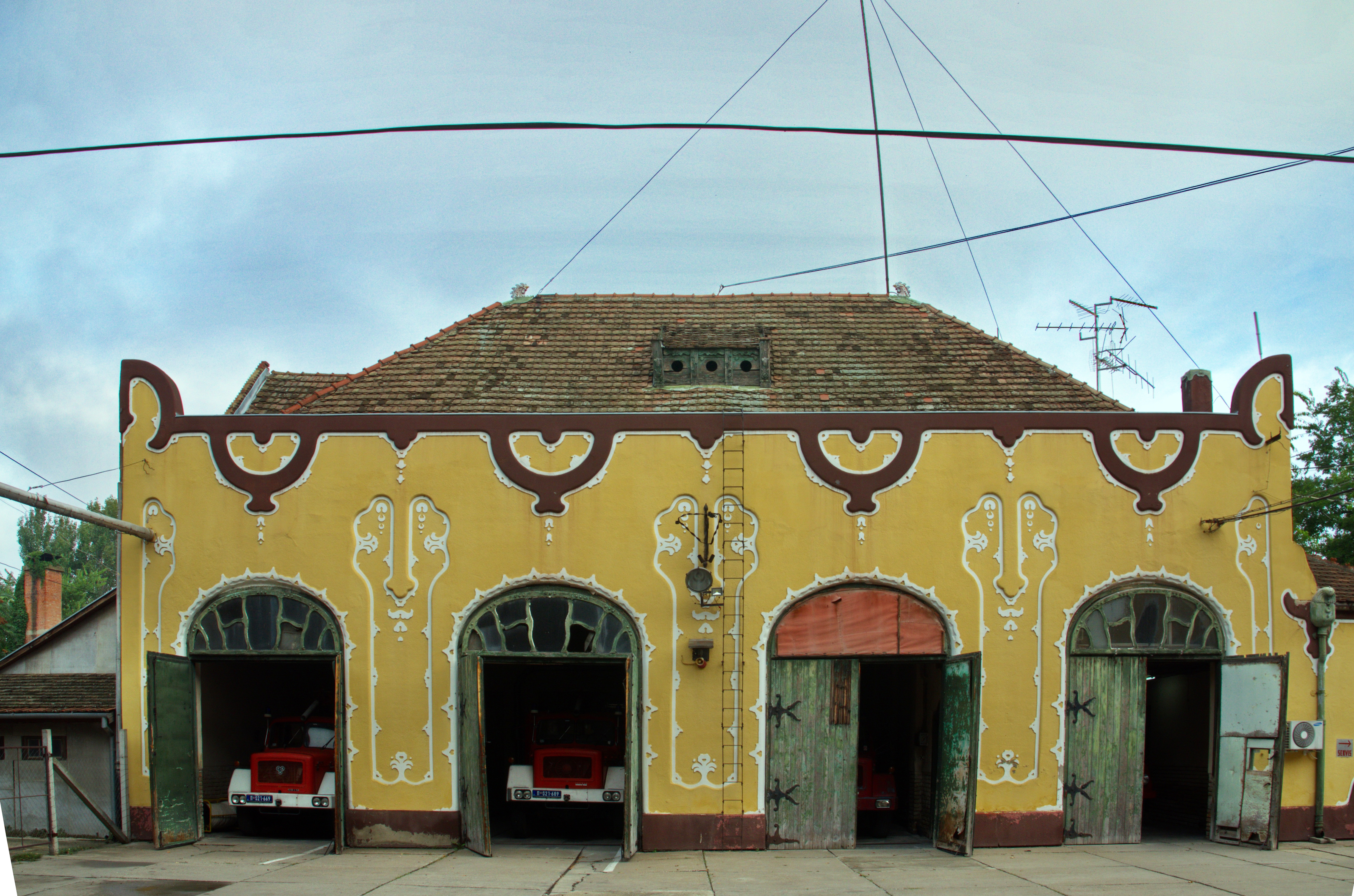 Feuerwache Senta, Serbien